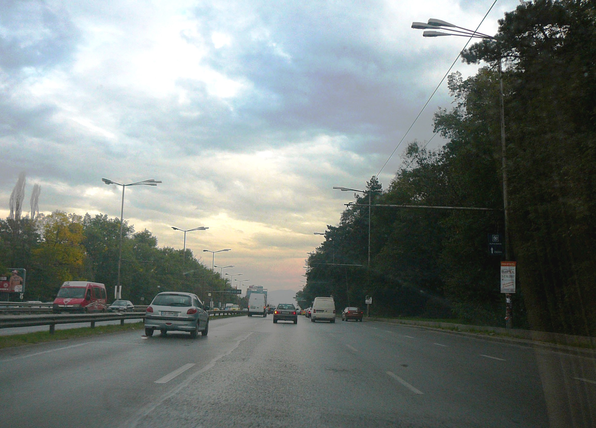 Цариградско шосе, София